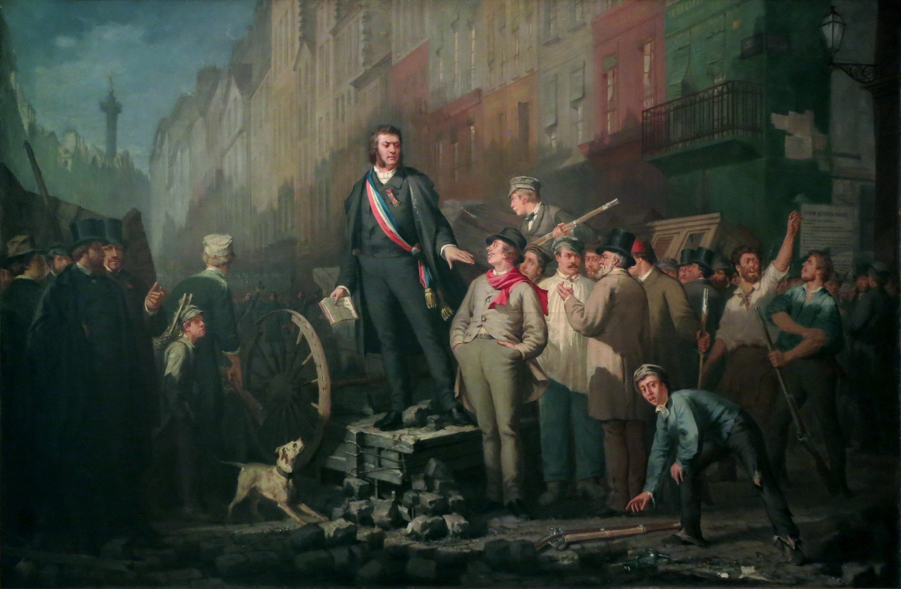 Alphonse Baudin (1811-1851) sur la barricade du faubourg Saint-Antoine, le 3 décembre 1851title QS:P1476,fr:"Alphonse Baudin (1811-1851) sur la barricade du faubourg Saint-Antoine, le 3 décembre 1851" label QS:Lfr,"Alphonse Baudin (1811-1851) sur la barricade du faubourg Saint-Antoine, le 3 décembre 1851"